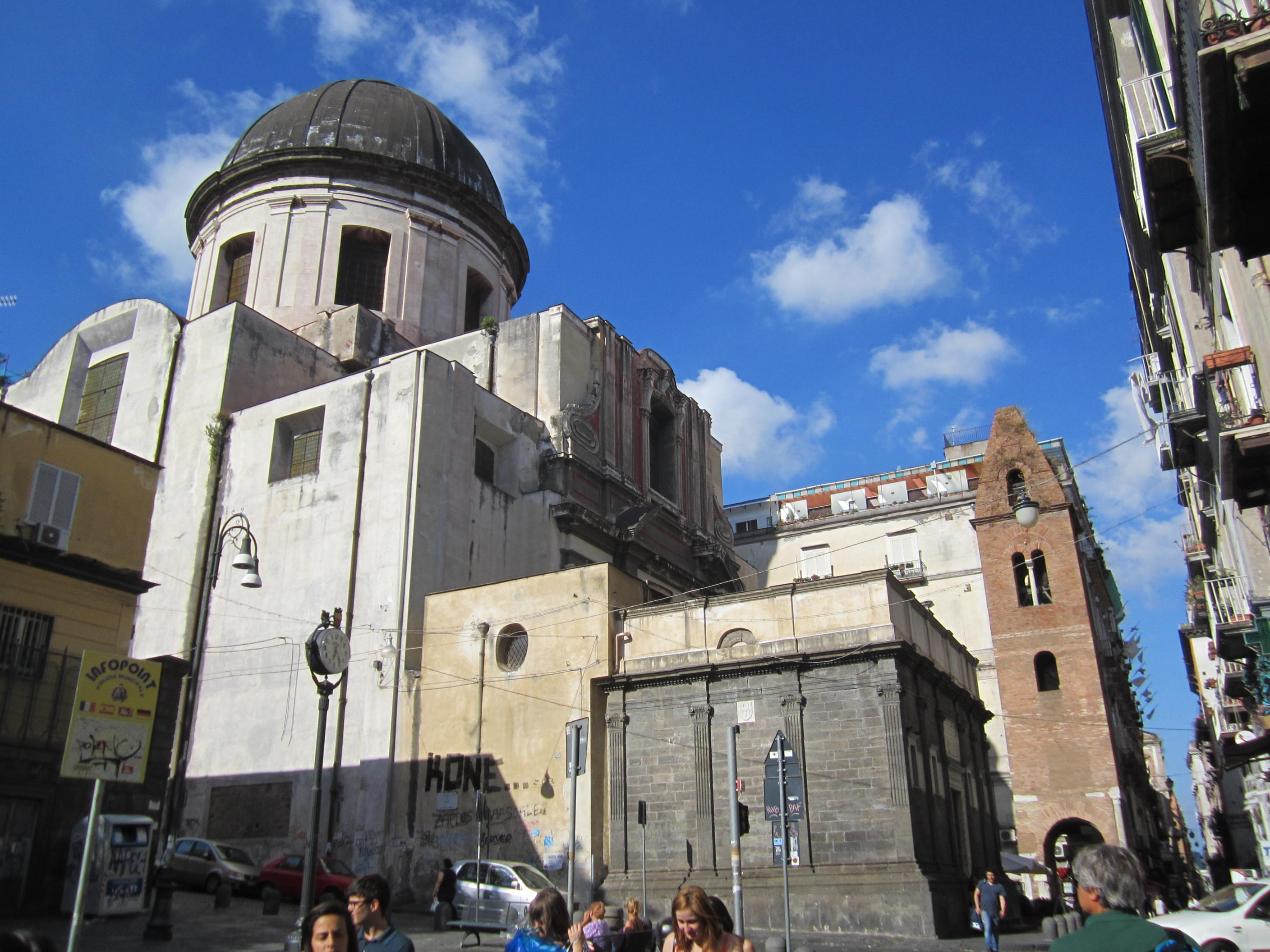 Chiesa di Santa Maria Maggiore alla Pietrasanta a Napoli